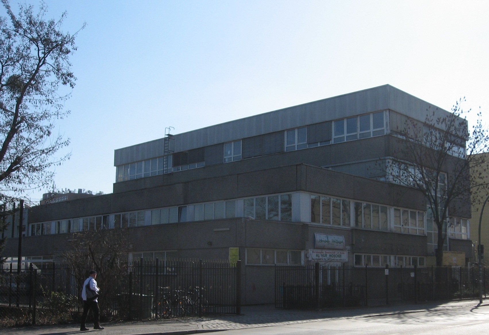 Al-Nur-Moschee von der Haberstraße aus gesehen.